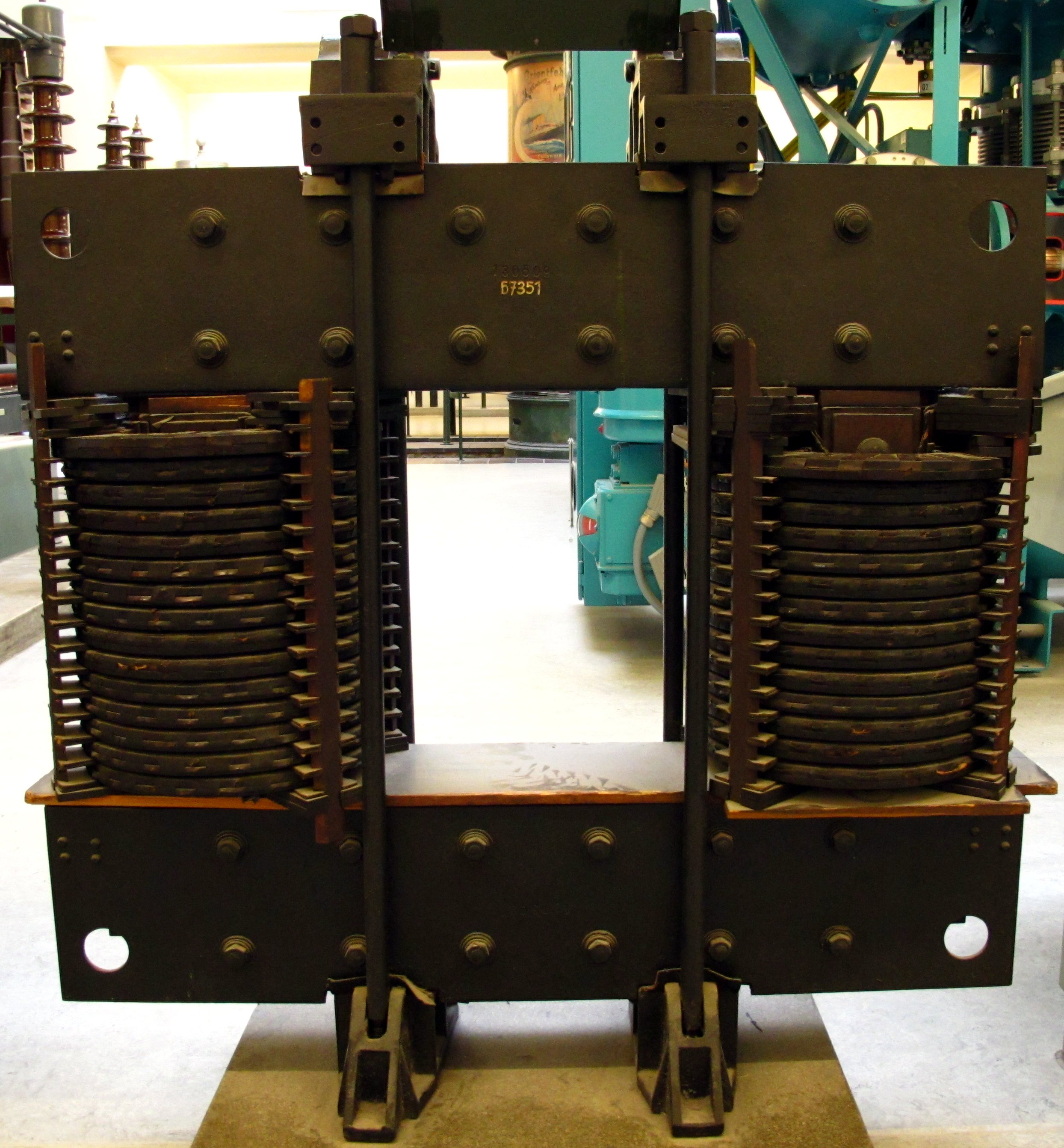 Erste Erdschlussspule von Petersen, 1917. Diese Spule zur Lichtbogenlöschung bei einpoligen Erdschlussfehlern an Freileitungen wurde 1917 behelfsmässig von Waldemar Petersen in das 11-kV-Netz der Kraftwerke Altwürttemberg AG in Ludwigsburg eingebaut. Nach erfolgreichen Versuchsbetrieb war diese Spule bis 1928 zur Erdschlusskompensation von Strömen bis zu 40 A in Betrieb.